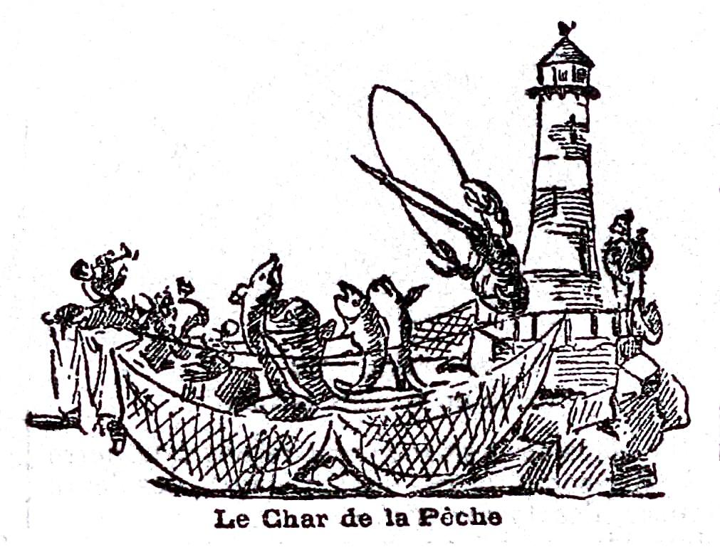 Le Char de la Pêche du cortège de la Mi-Carême à Paris en 1900.